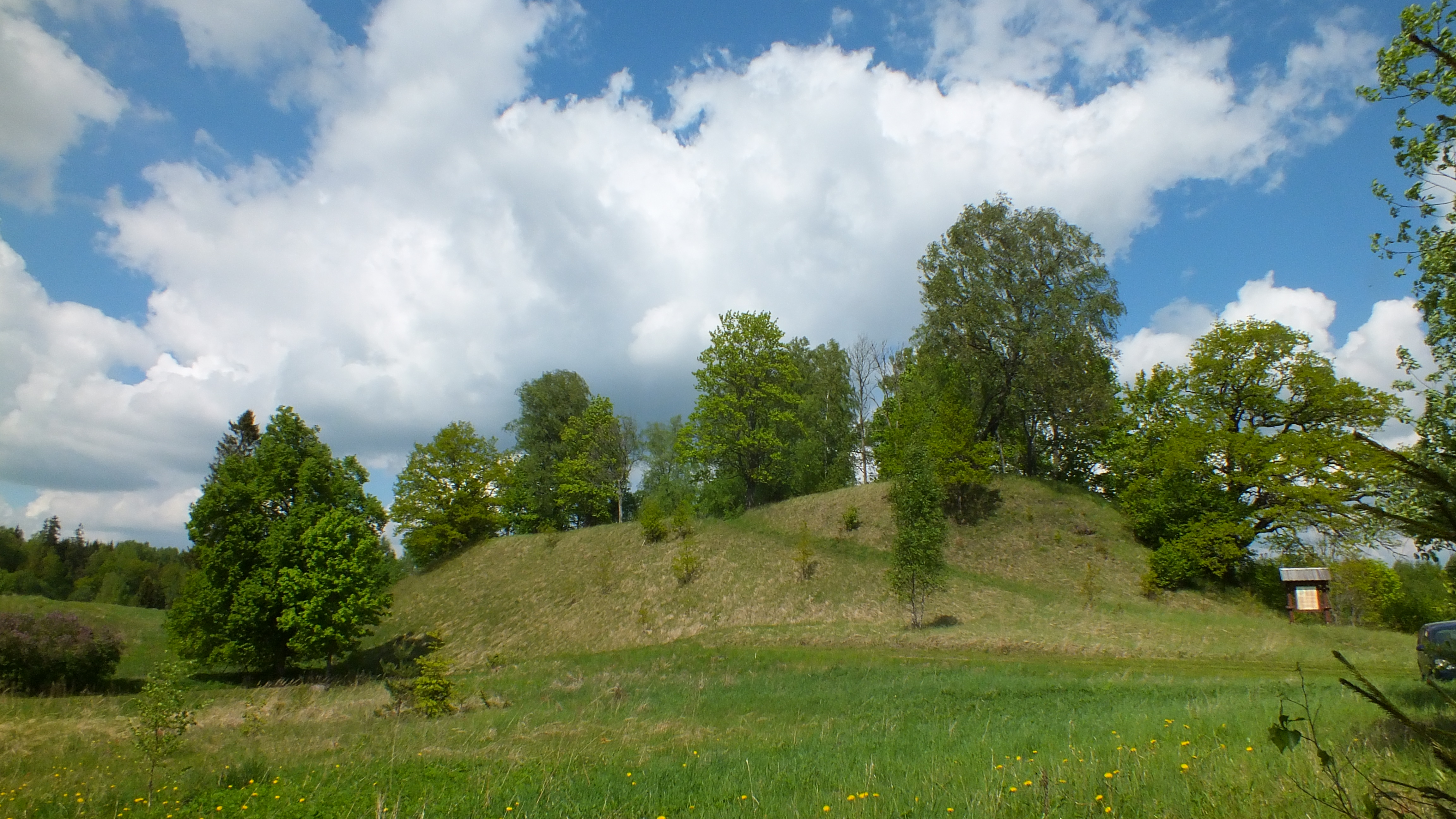 Mežites pilskalns no dienvidiem